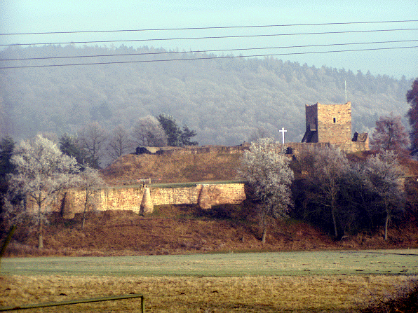 Burgruine Wartenberg (Dez. 2004) (Original text: Die Burgruine Wartenberg bei der Gemeinde Wartenberg)